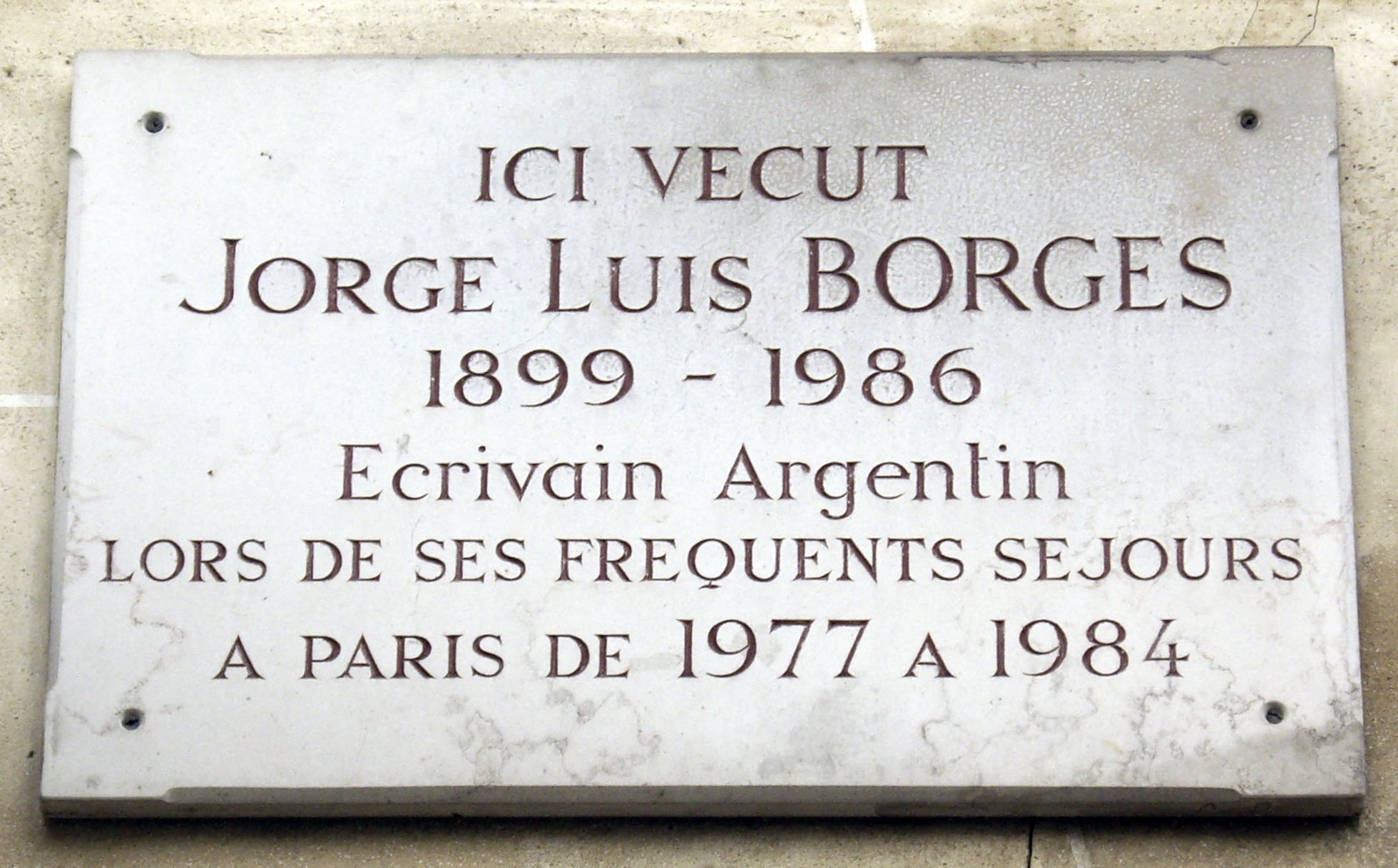 Plaque apposée au n° 13 de la rue des Beaux-Arts, Paris 6e, où résidait l'écrivain Jorge Luis Borges (1899-1986) lors de ses séjours à Paris entre 1977 et 1985.